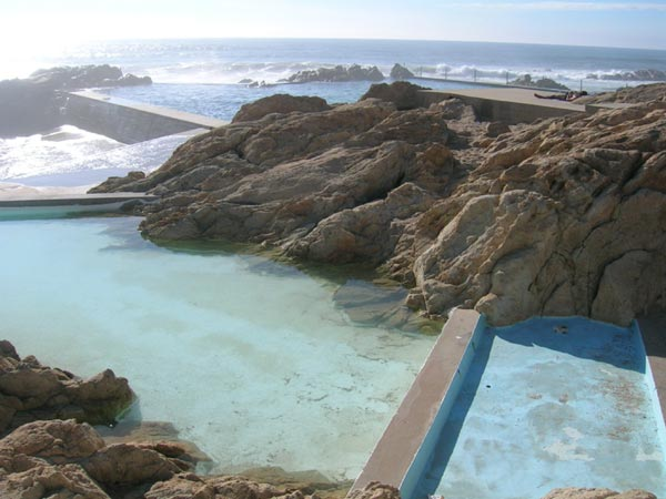 Architektur: Álvaro Siza Vieira: Strandbad in Leça da Palmeira (Portugal)